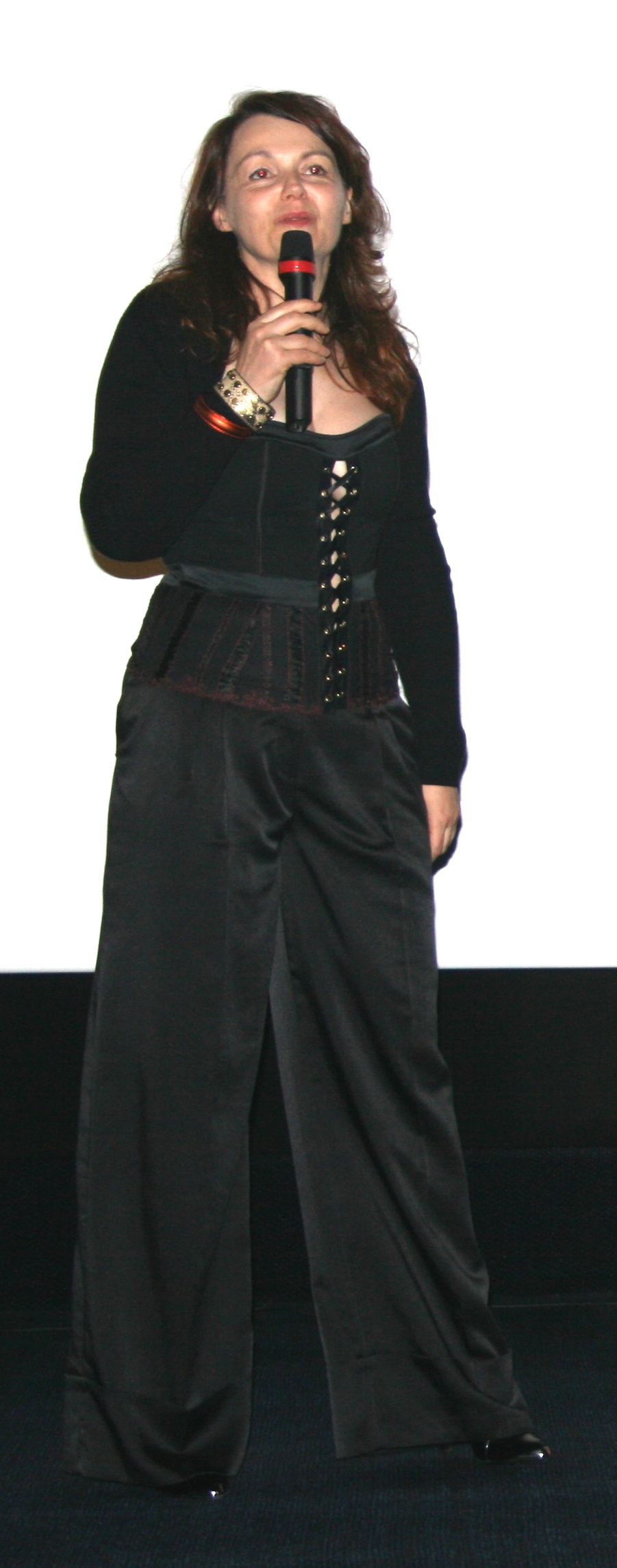 Agnès Merlet à l'avant-première de Dorothy diffusée à l'UGC Ciné Cité Bercy, à Paris.